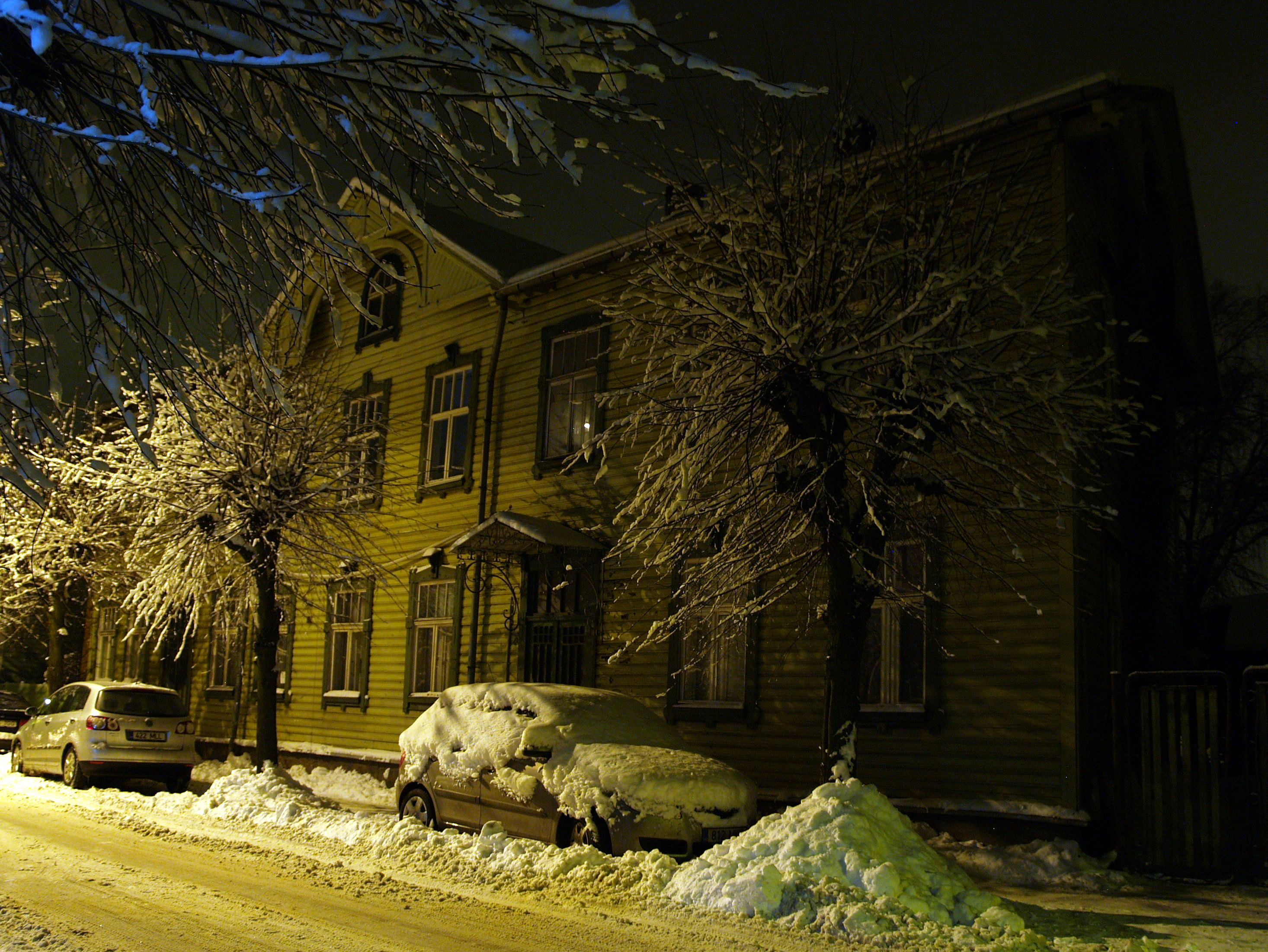 Puitelamu Tartus Õnne tänav 33. Ehitatud 1907-1914.